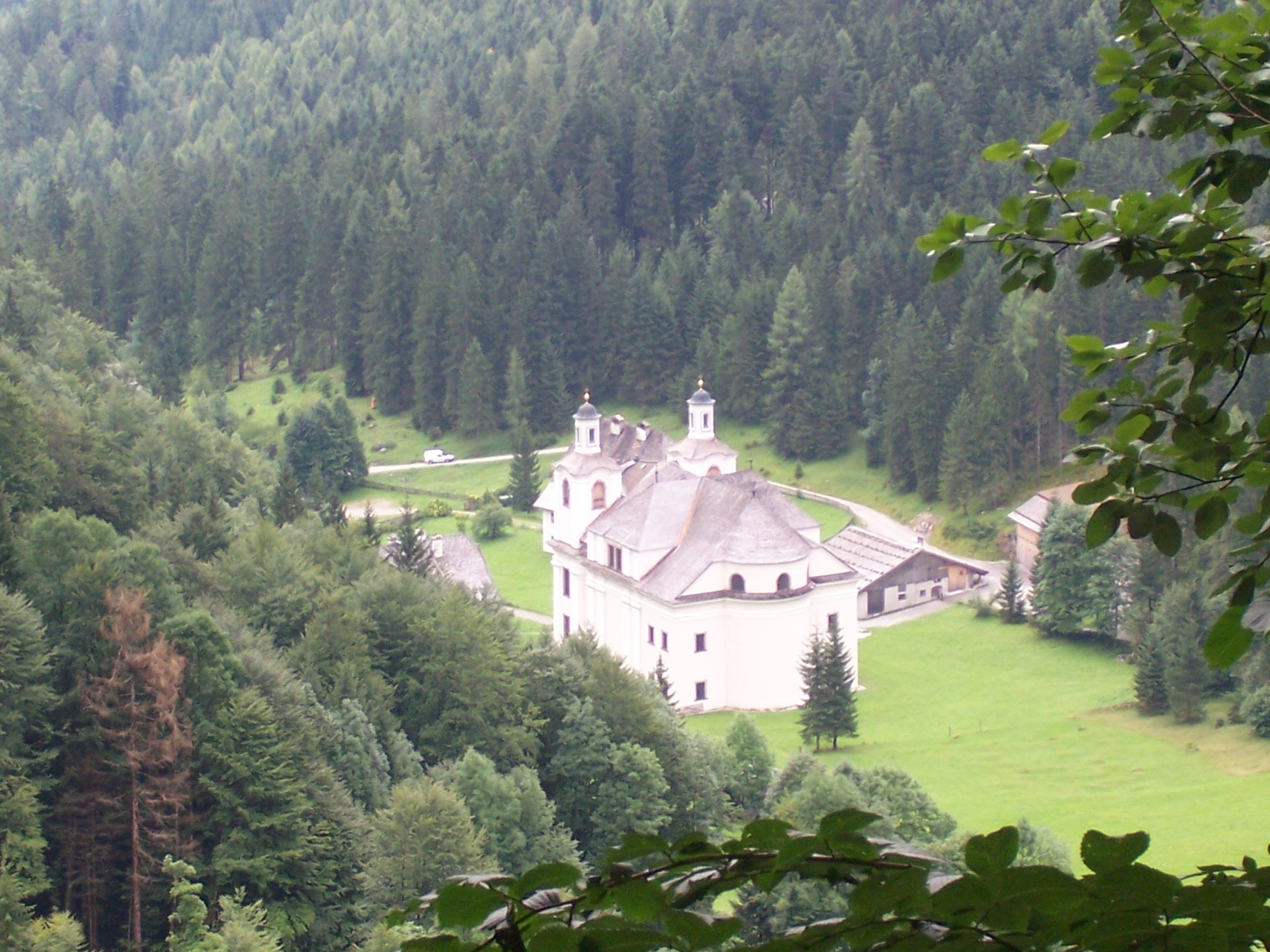 Maria Kirchental in Sankt Martin bei Lofer (Österreich)